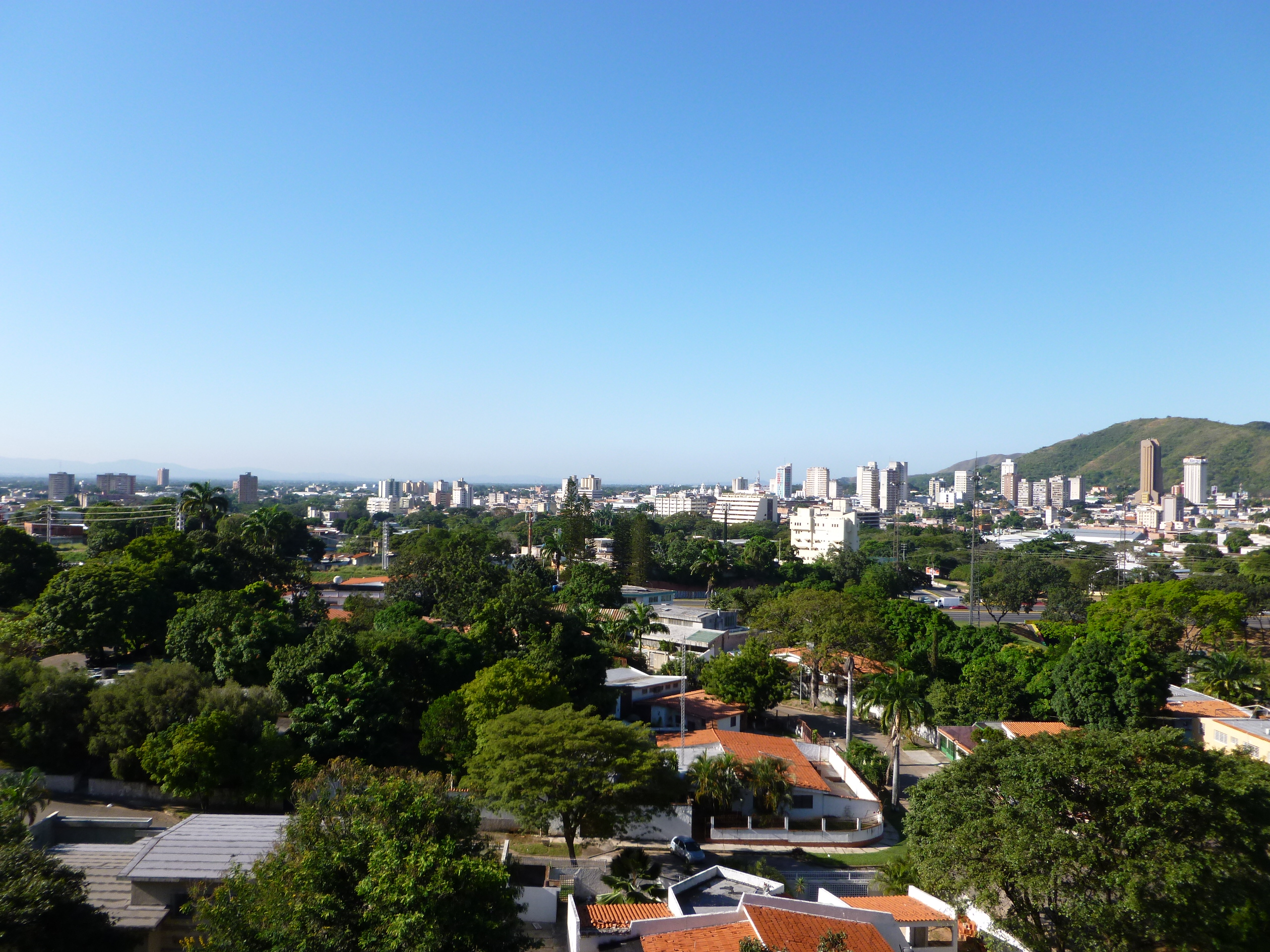 Foto de Lomas del Este en Valencia